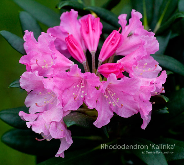 Россия, Владимирская область